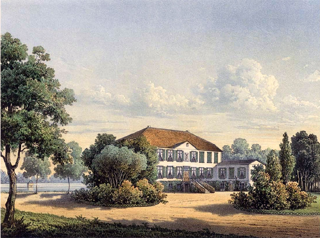 Rittergut Patthorst im Königreich Westphalen, Regierung-Bezirk Minden, Kreis Halle Nach ein. Original-Aufnahme ausgef. v. Theodor Albert, gedr. b. Winckelmann u. Söhne. Verlag von Alexander Duncker, Königl. Hofbuchhändler in Berlin